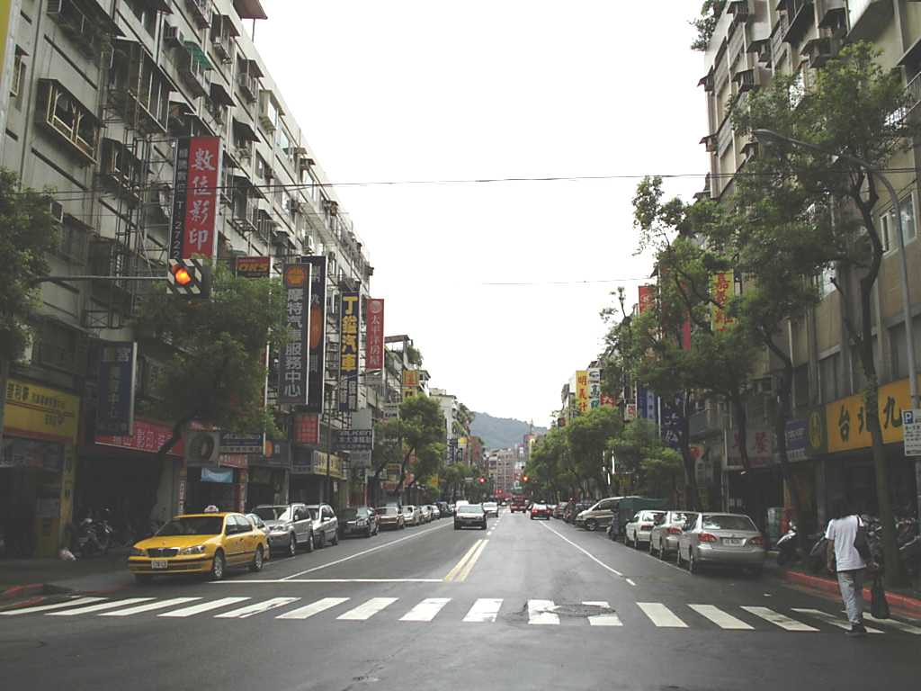 中文（台灣）: 臺北市信義區莊敬路，自行拍攝。